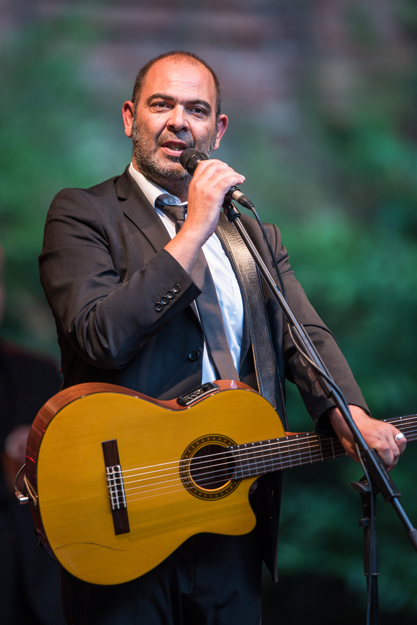 Concertbüro Franken,Hannes Ringlstetter,Konzert,Livekonzert,Livemusik,Musik,Serenadenhof,Tour Paris. New York. Alteiselfing